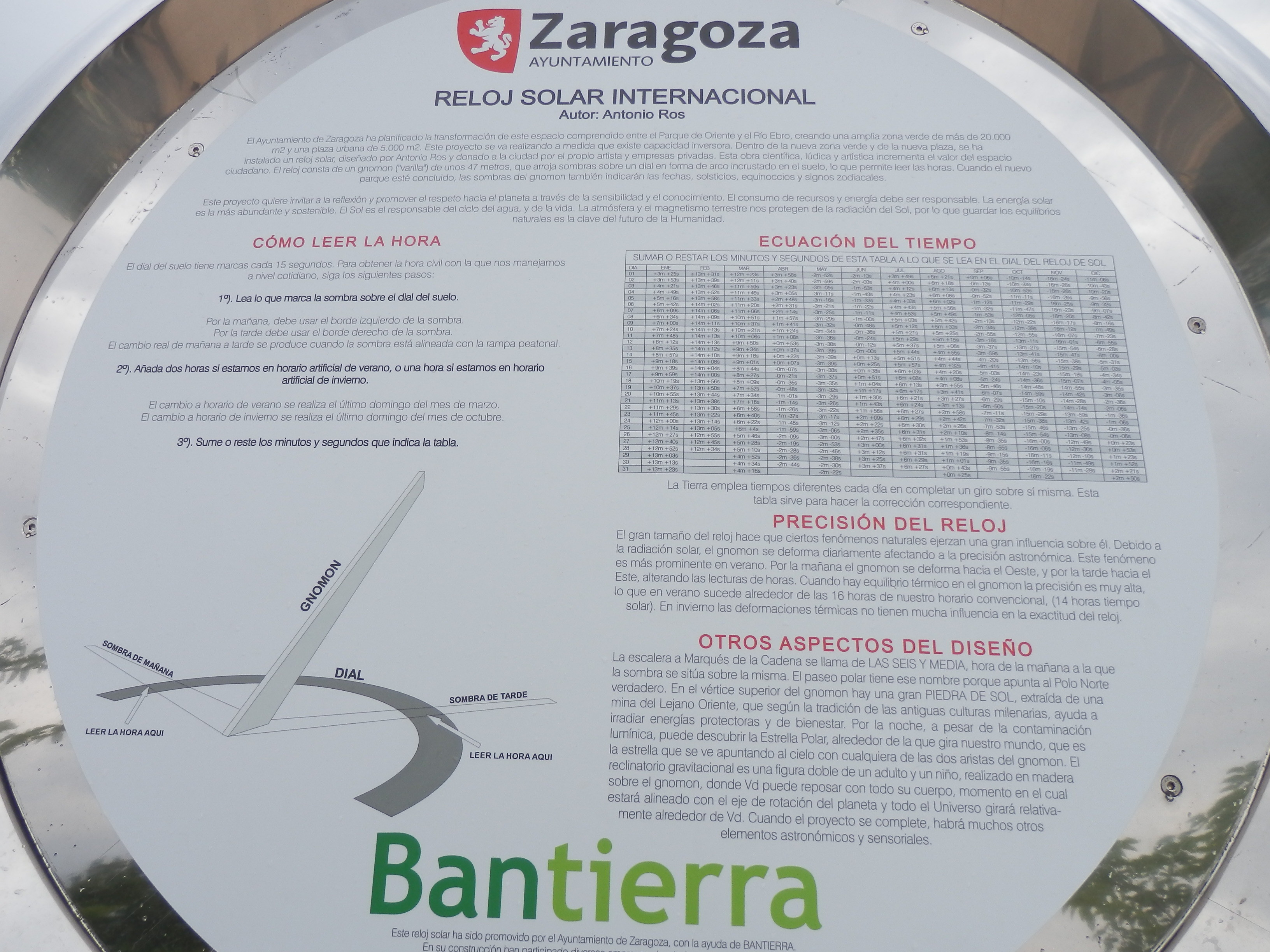 Descripción del Reloj Solar Internacional de Zaragoza con instrucciones para leer la hora.